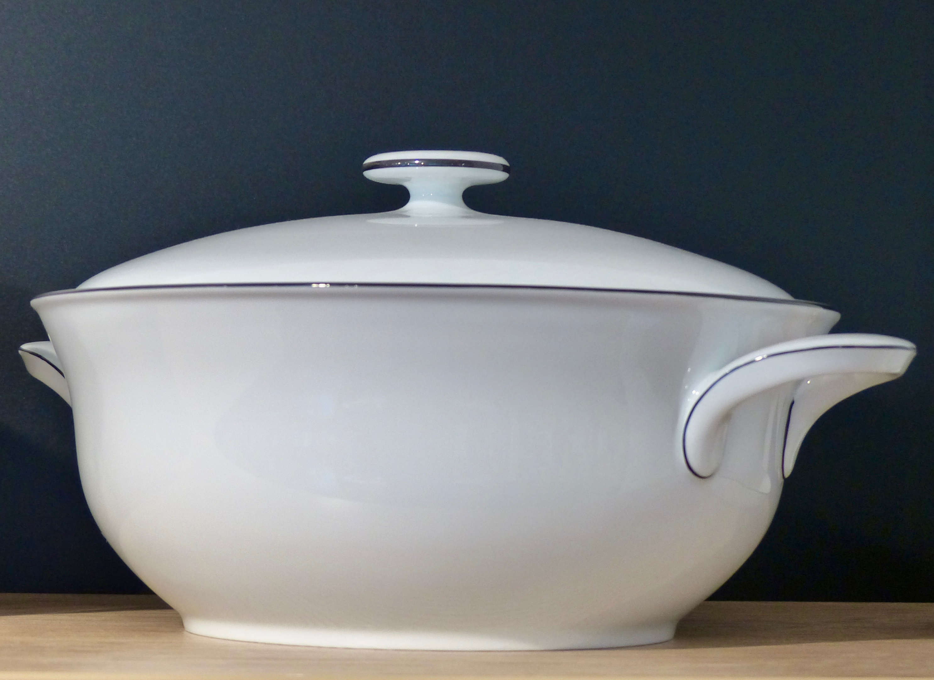 Geschirrteil des Service Wagenfeld 639: Deckelterrine GLAM-on-Tour: Porzellanmanufaktur Fürstenberg Wikipedianer fotografierten vom 6.– 8. Oktober 2017 die Ausstellungstücke im Museum Schloss Fürstenberg, Glasmuseum Boffzen und im Kragstuhlmuseum. This photo was taken during a project supported by WMDE Gefördert von / Supported by: Wikimedia Deutschland, Museum Schloss Fürstenberg, Glasmuseum Boffzen und Kragstuhlmuseum Für das Museum Schloss Fürstenberg: This work is free and may be used by anyone for any purpose. If you wish to use this content, you do not need to request permission as long as you follow any licensing requirements mentioned on this page.